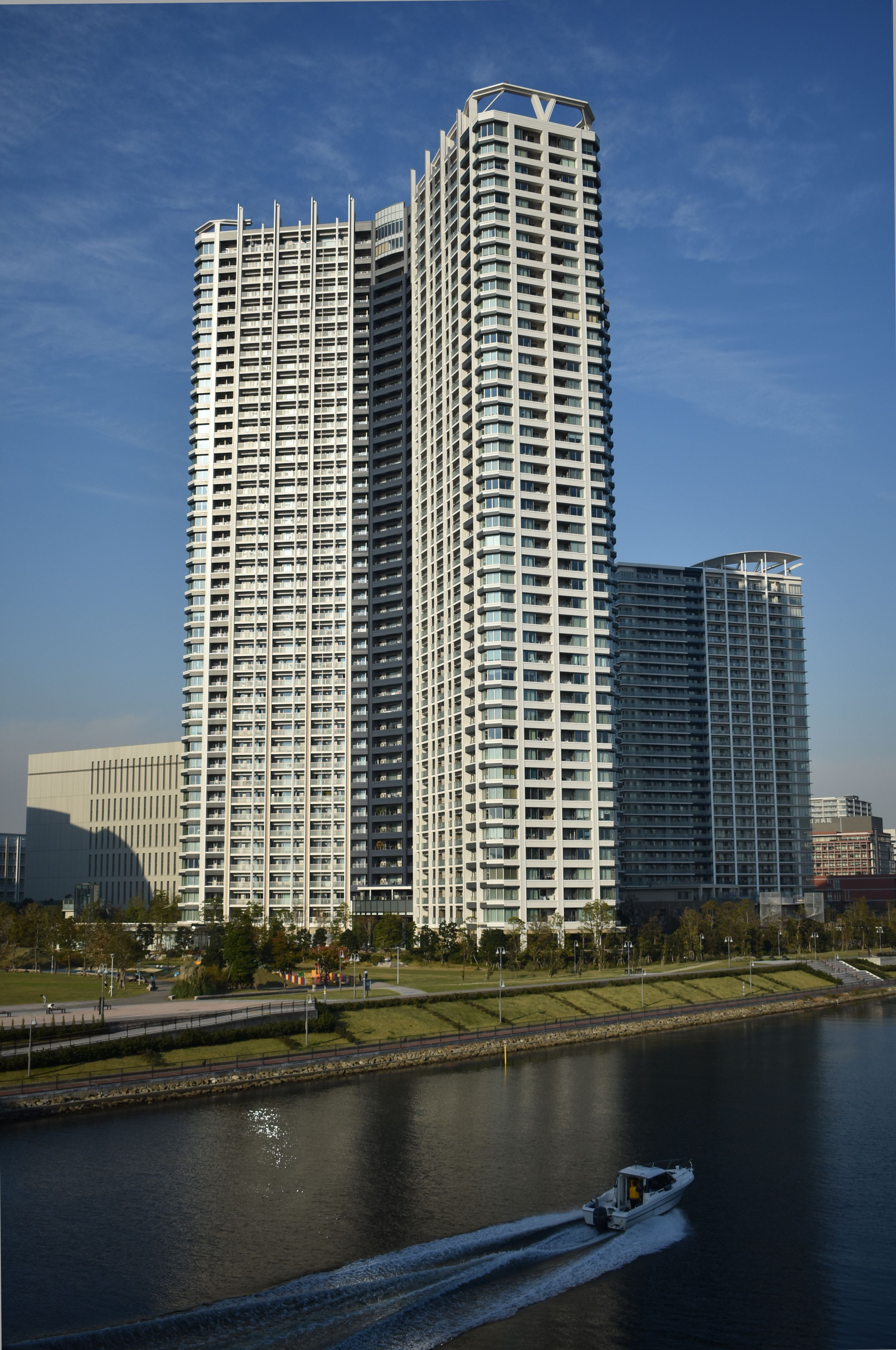 スカイズタワー